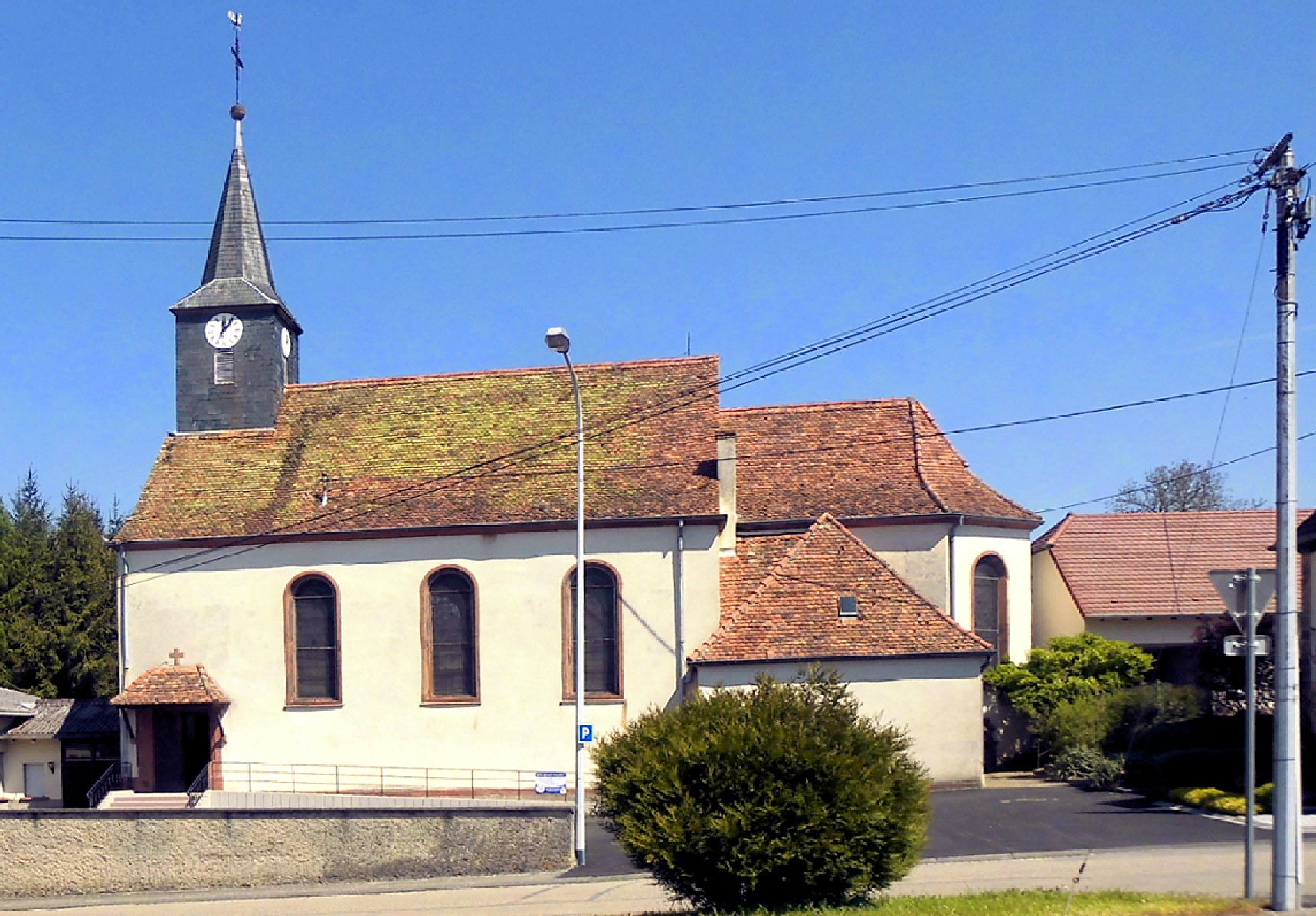 L'église Saint-Georges à Keffenach, côté sud